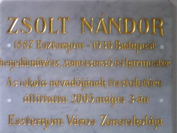 Zsolt Nándor emléktáblája Esztergomban, a Zsolt Nándor Zene- és Művészeti Iskola épületének aulájában